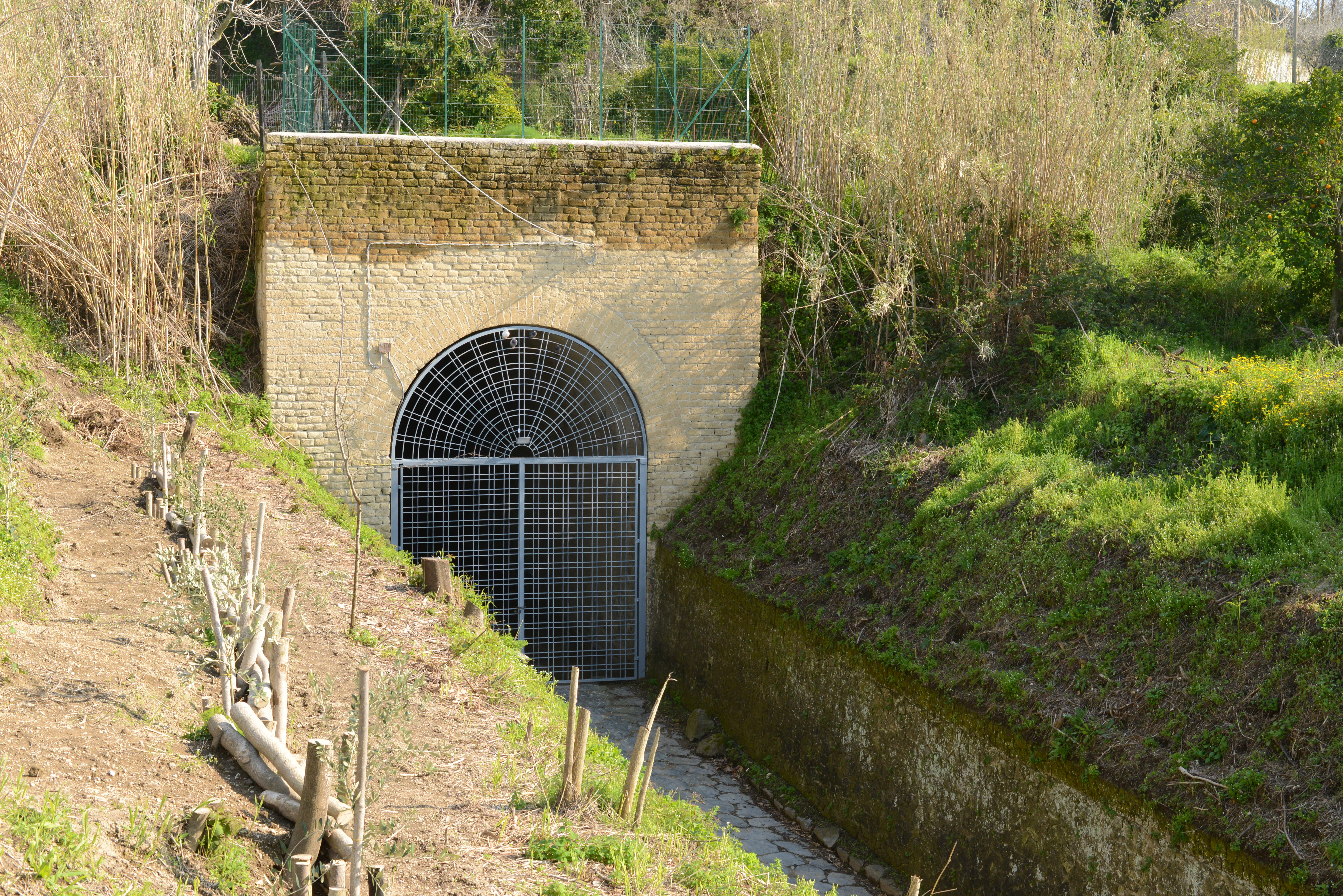 Uscita della Grotta di Cocceio - lato Nord-Ovest